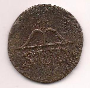 Esta moneda fue acuñada por las tropas de José Ma. Morelos y Pavón.